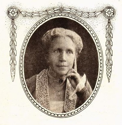 Lizinka Dyrssen